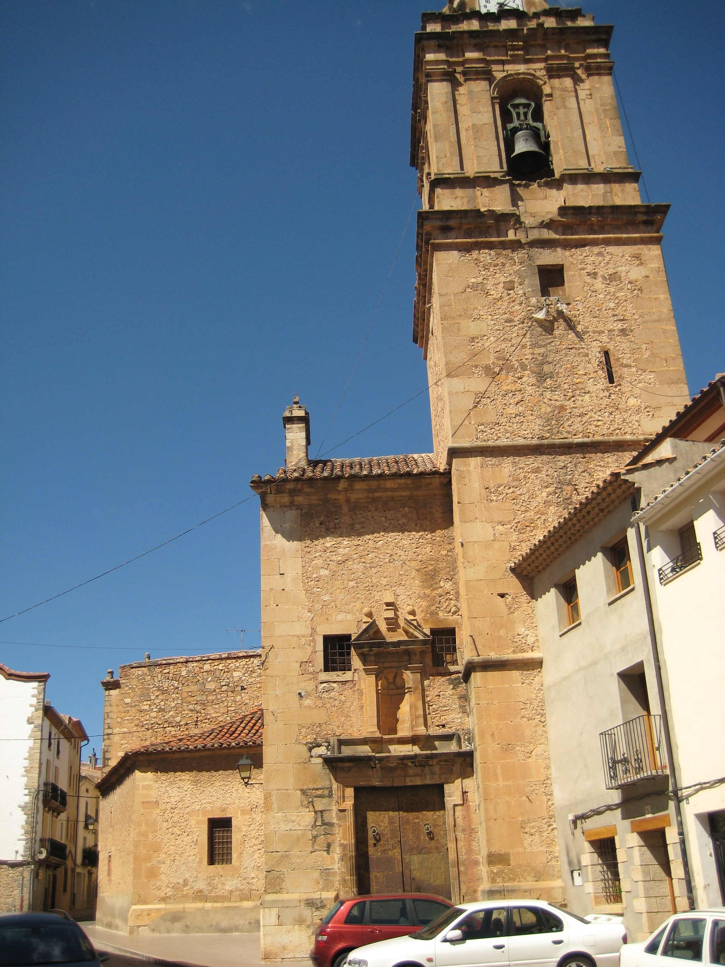 Església de Sant Bartomeu d'Atzeneta del Maestrat (l'Alcalatén)